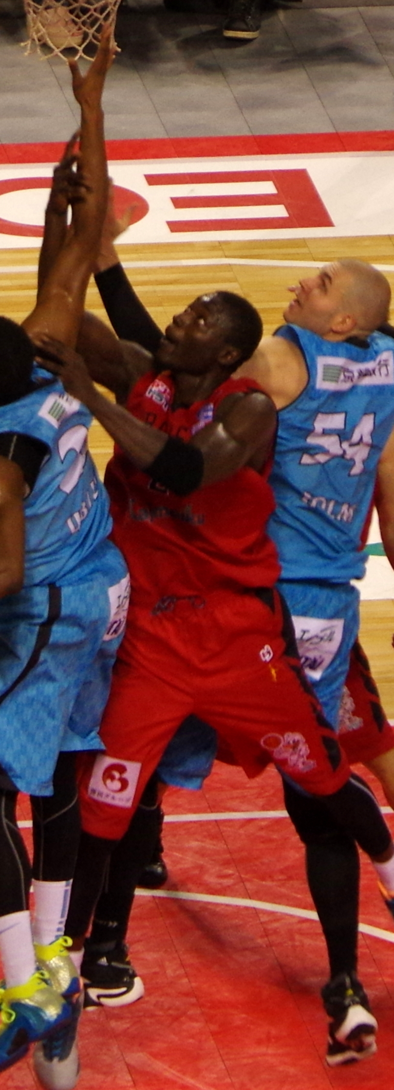 ｂｊリーグ 2013-2014シーズン プレイオフ ファイナルズ_015